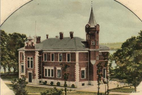 Jagdschloss Prillwitz (Liepser Schlösschen) an der Lieps, ein Nebengewässer des Tollensesee nahe Neubrandenburg. Es gehört zur Gemeinde Hohenzieritz. Heute wird es als Hotel und Restaurant genutzt und bietet von der Gartenterrasse einen Blick auf das Wasser der naturbelassenen Lieps.